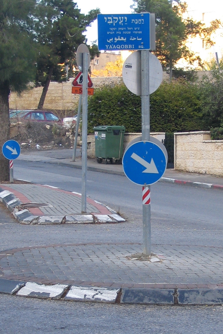 רחבת יעקבי, שכונת בית הכרם, ירושלים: ע"ש רחל ויצחק יעקבי, ממיסדי שכונת בית הכרם.